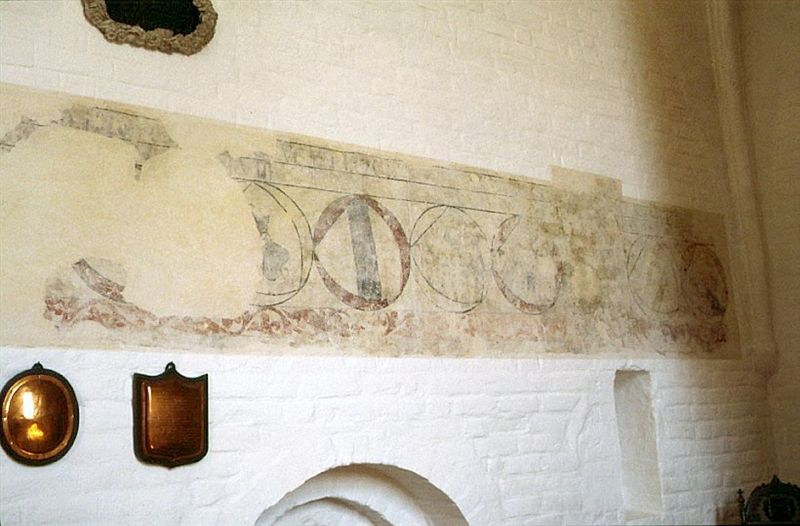 Kalkmaleri med våben på korets nordvæg da: Tvilum Kirke